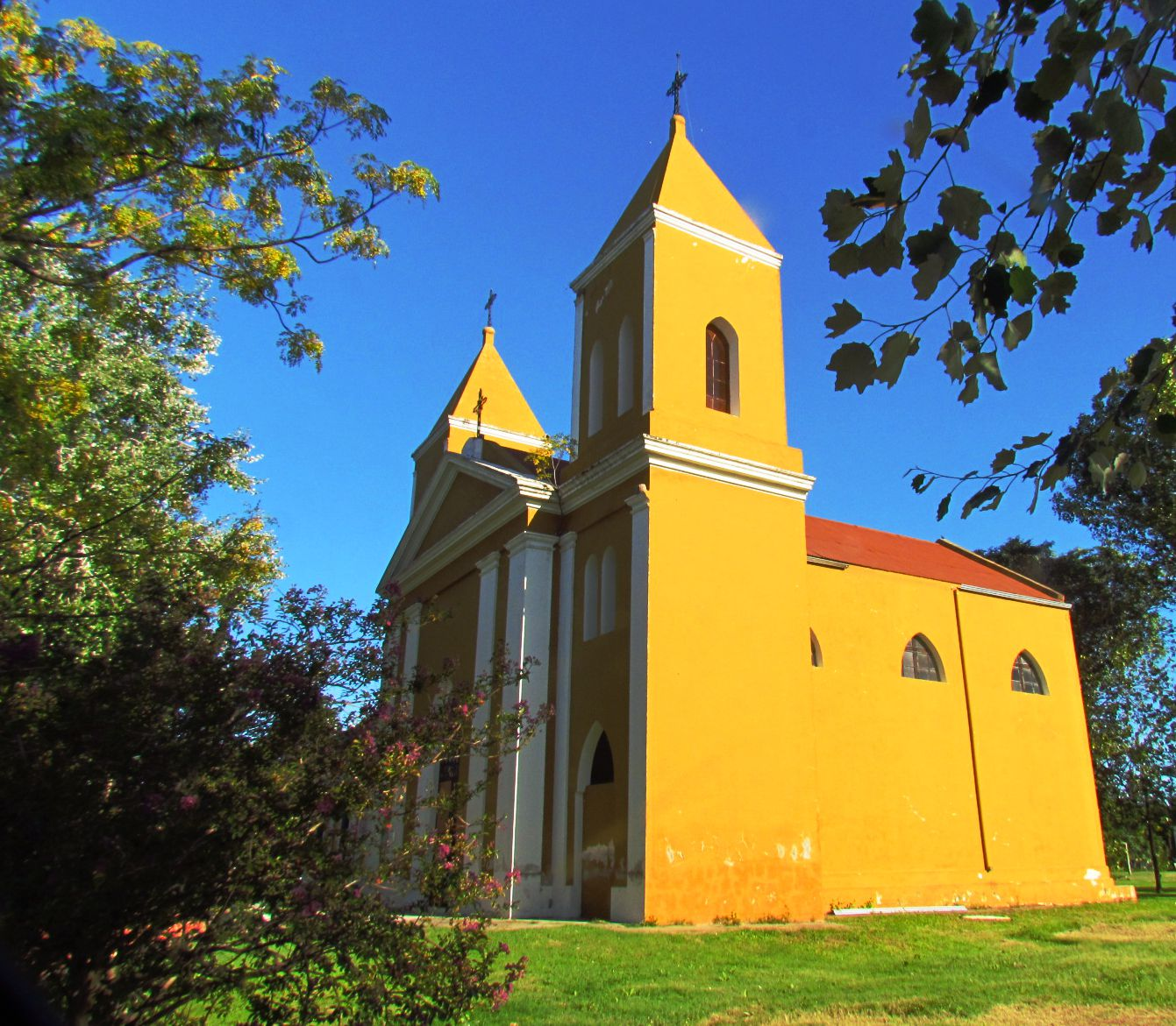 Villa Urquiza, Entre Rios, Argentina